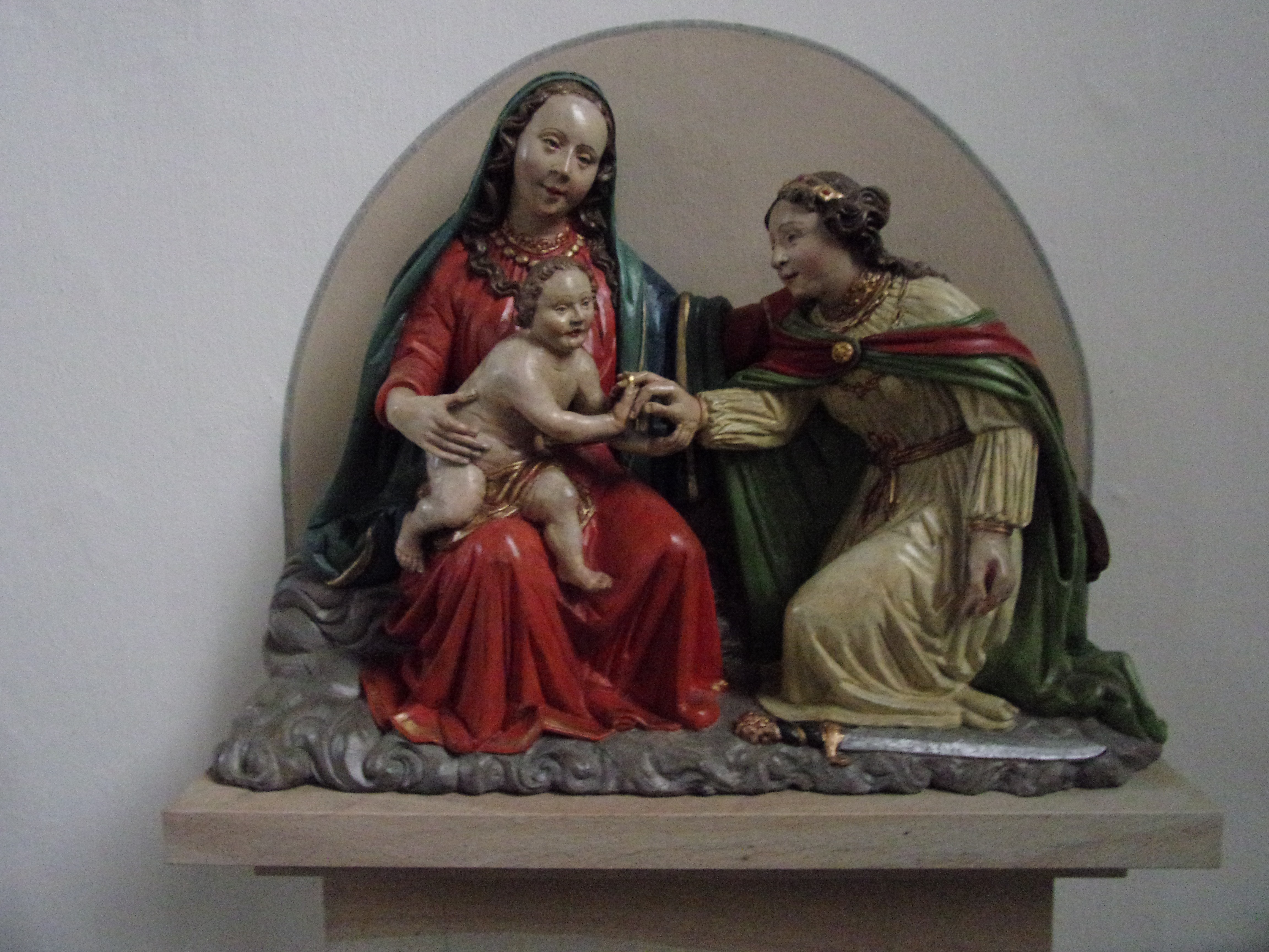 Katharinas mystische Hochzeit mit dem Jesuskind